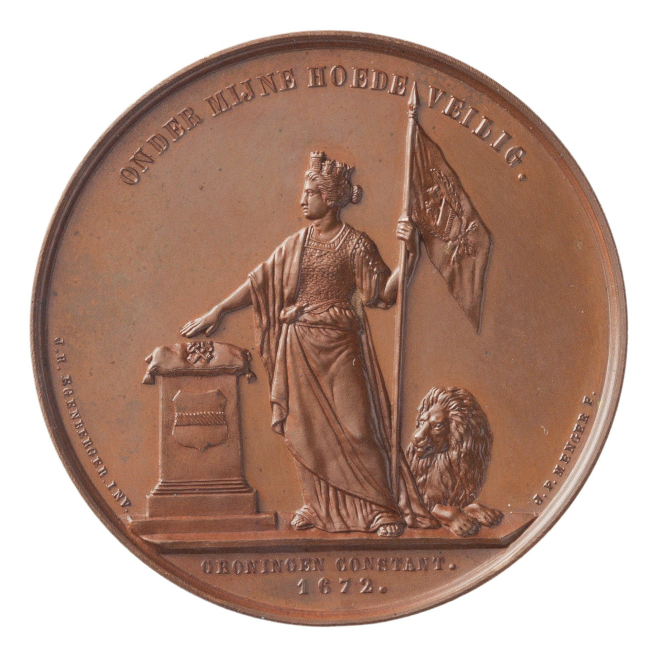 Gedenkpenning op het tweede eeuwfeest van het Gronings Ontzet (1862) Voorzijde: de staande Groningse Stedenmaagd, met in haar linkerhand een vaan met het stadswapen. Ze strekt de andere uit over een kussen met de sleutels van de stag, liggend op een voetstuk met aan de voorzijde het stadswapen. Achter de stedenmaagd ligt de Nederlandse leeuw. Omschrift: ONDER MIJNE HOEDE VEILIG. In de afsnede: GRONINGEN CONSTANT 1672. Signatuur: J.H. EGENBERGER INV. J.P. MENGER F. Keerzijde: Een monument met het borstbeeld van Rabenhaupt. Links en rechts vaandels en kanonnen. Signatuur: J.P.M. MENGER F Literatuur: L.W.A. Besier (1895) "De stempelsnijders van 's Rijks Munt te Utrecht in de laatste 50 jaren", Tijdschrift van het Nederlandsch Genootschap Munt- en Penningkunde, 2e jaargang, 1894. Amsterdam: G. Theod. Bom en zoon.